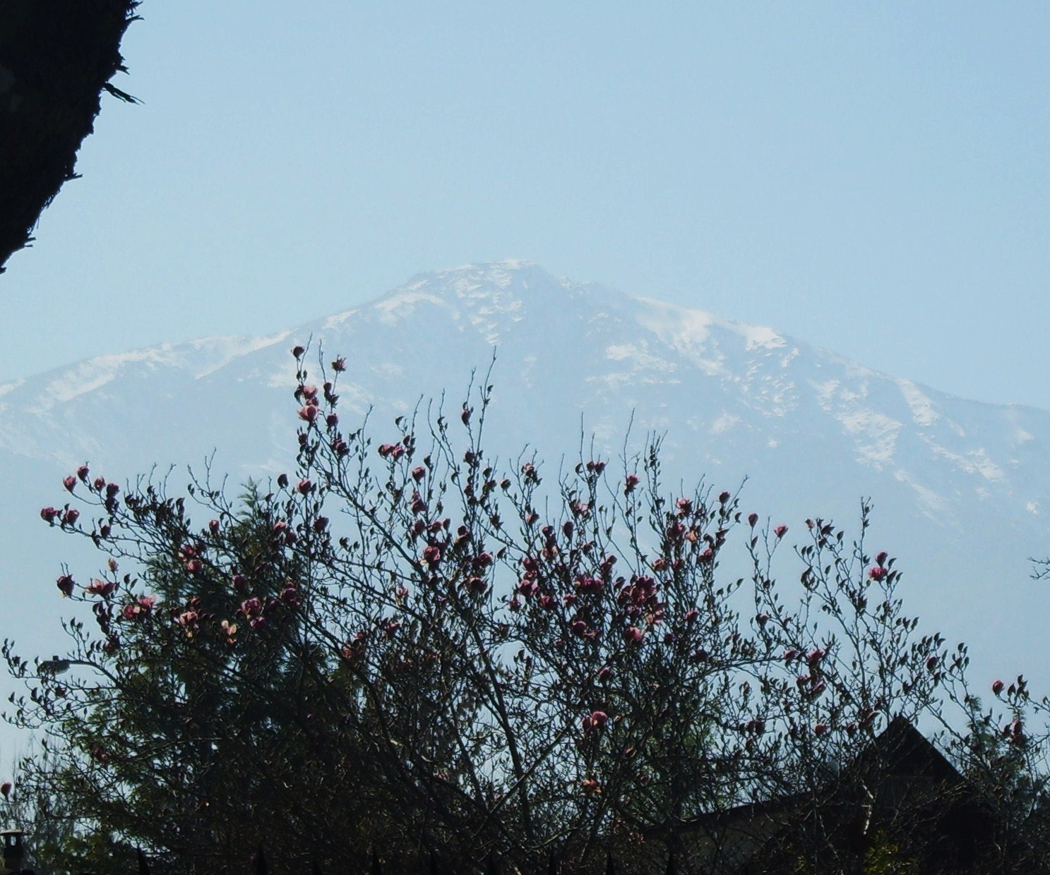 Cerro Provincia, desde la comuna de La Reina, Santiago de Chile